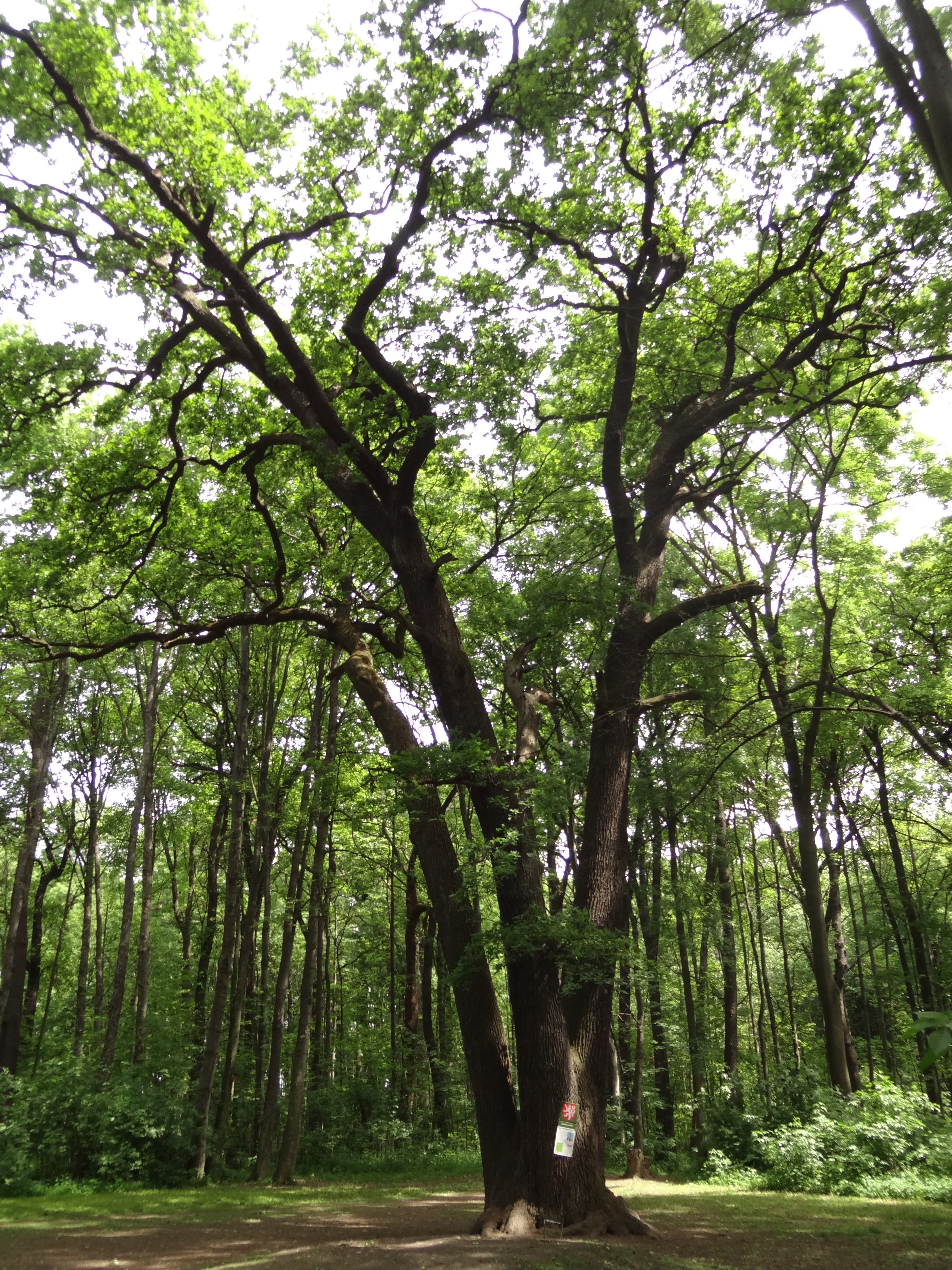 Satalice - památný dub letní (čtyřkmen)